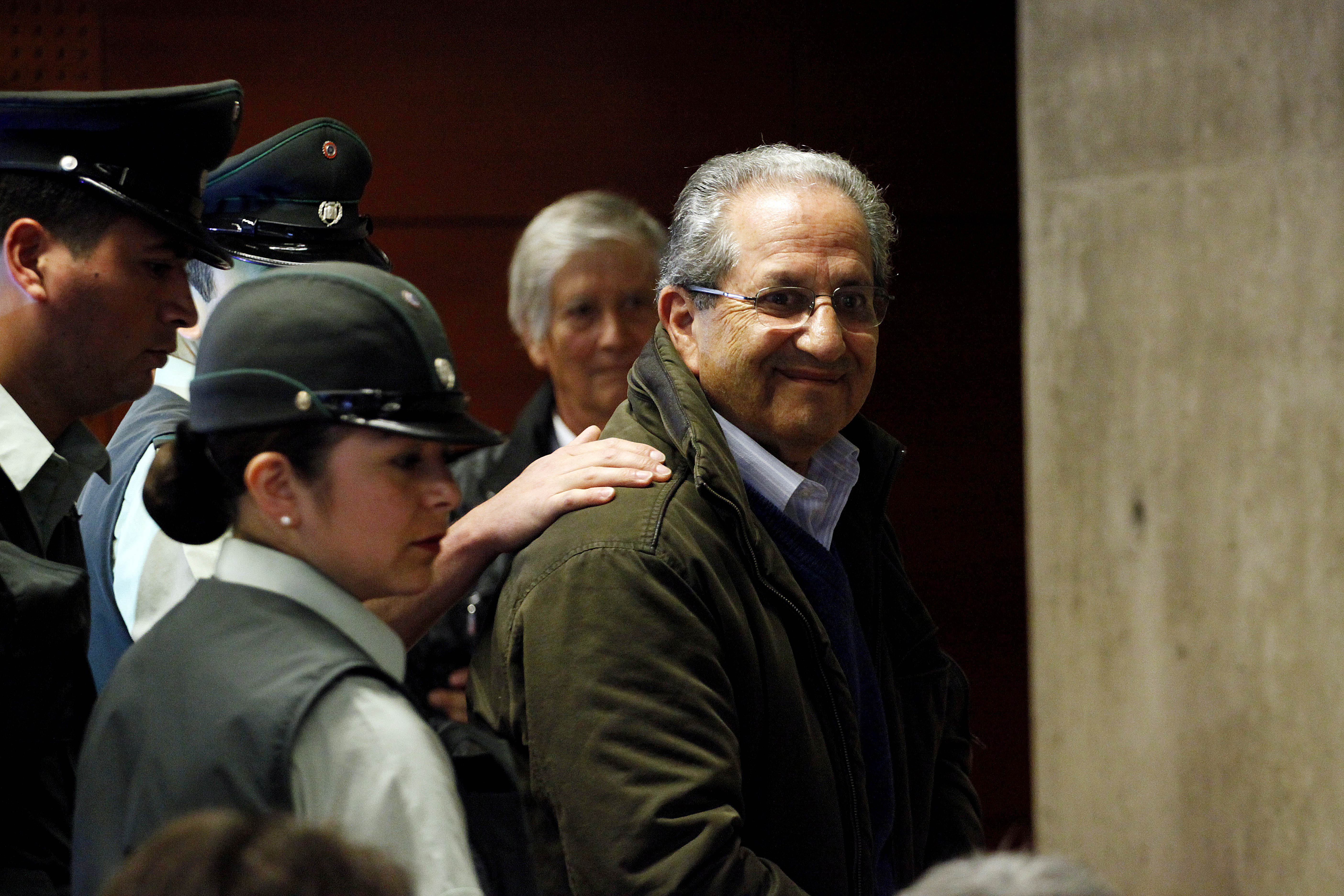 Ex Presidente de la CNA